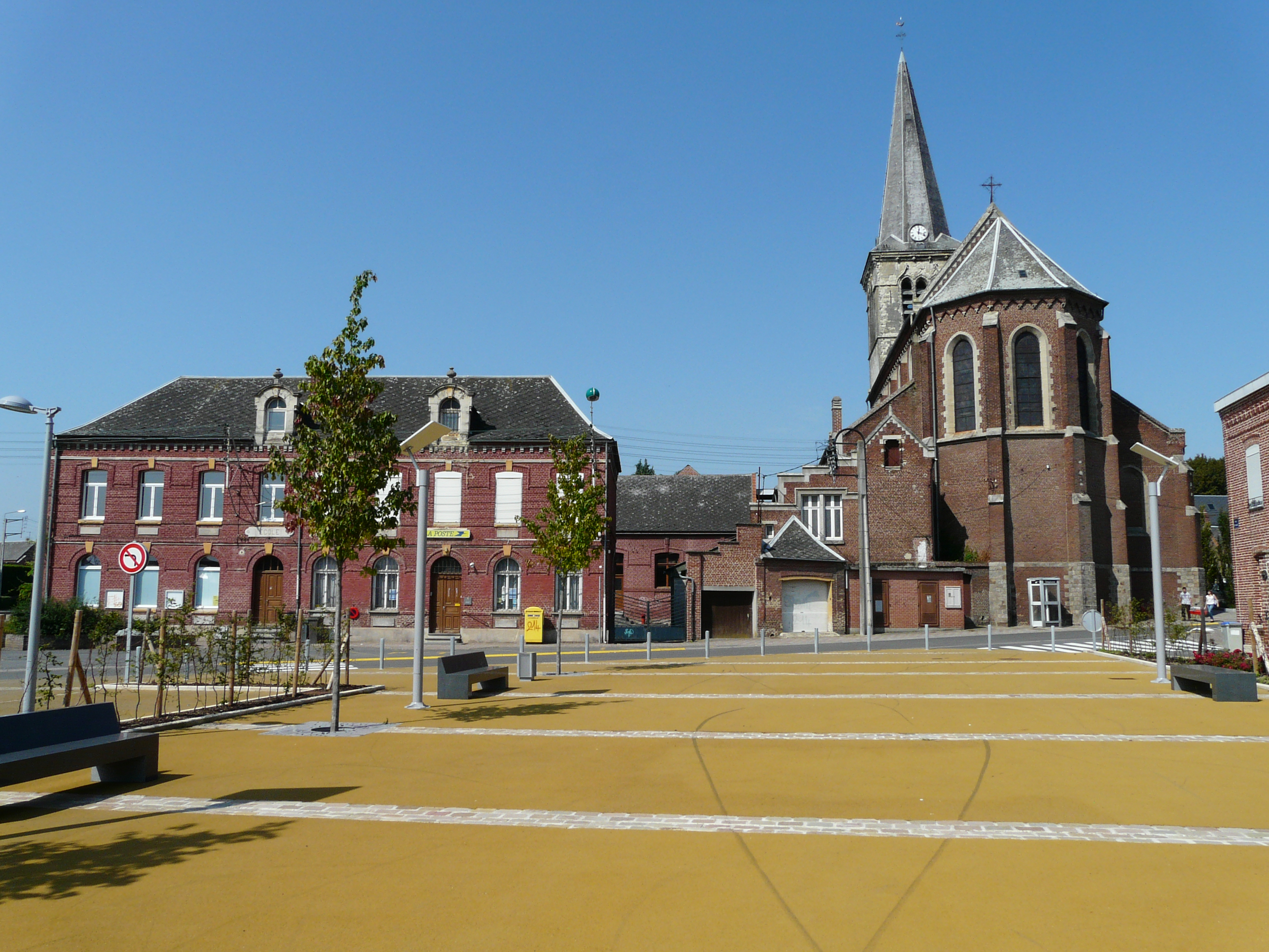 La place du village avec l'école, la poste et l'église